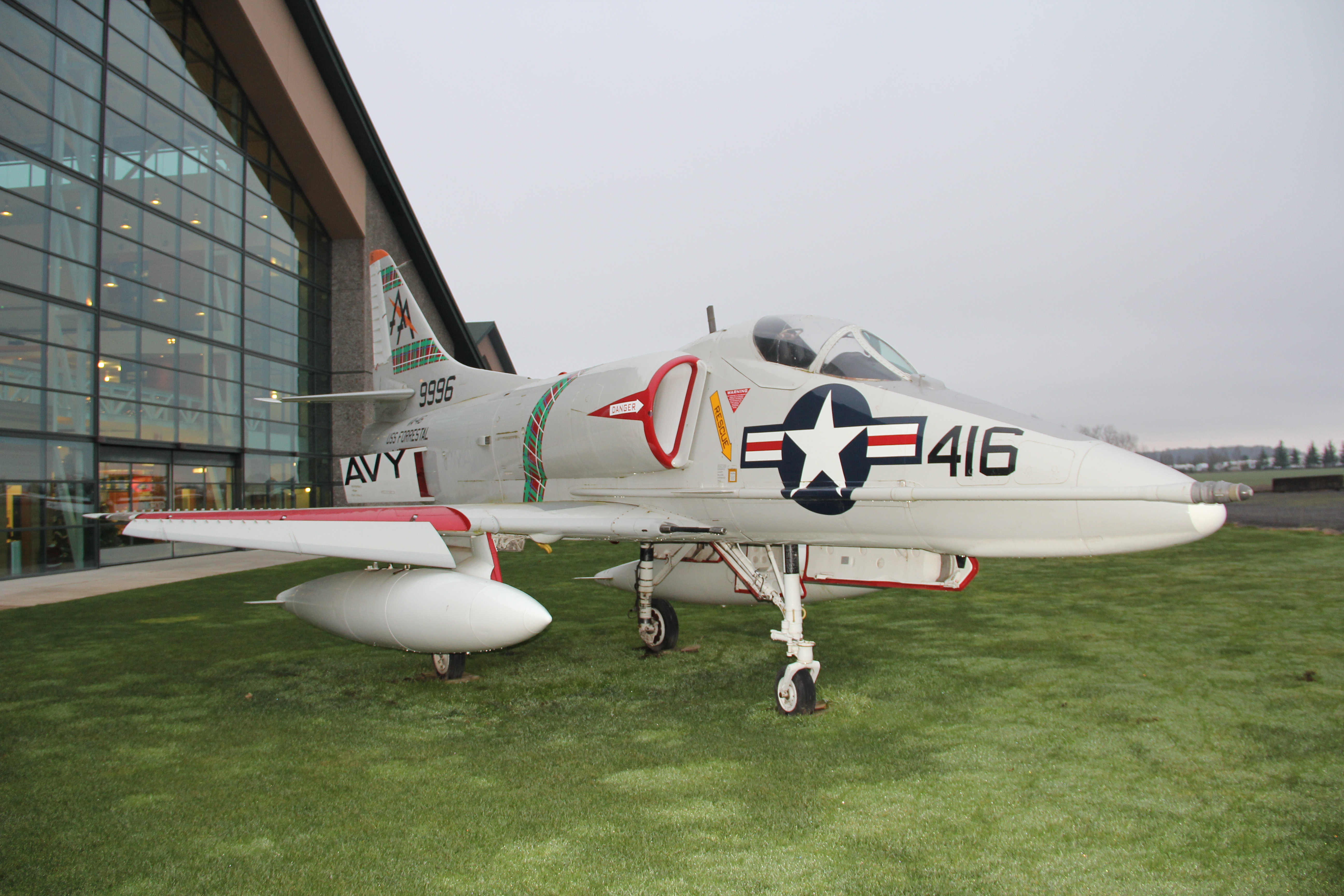 Douglas A-4E Skyhawk